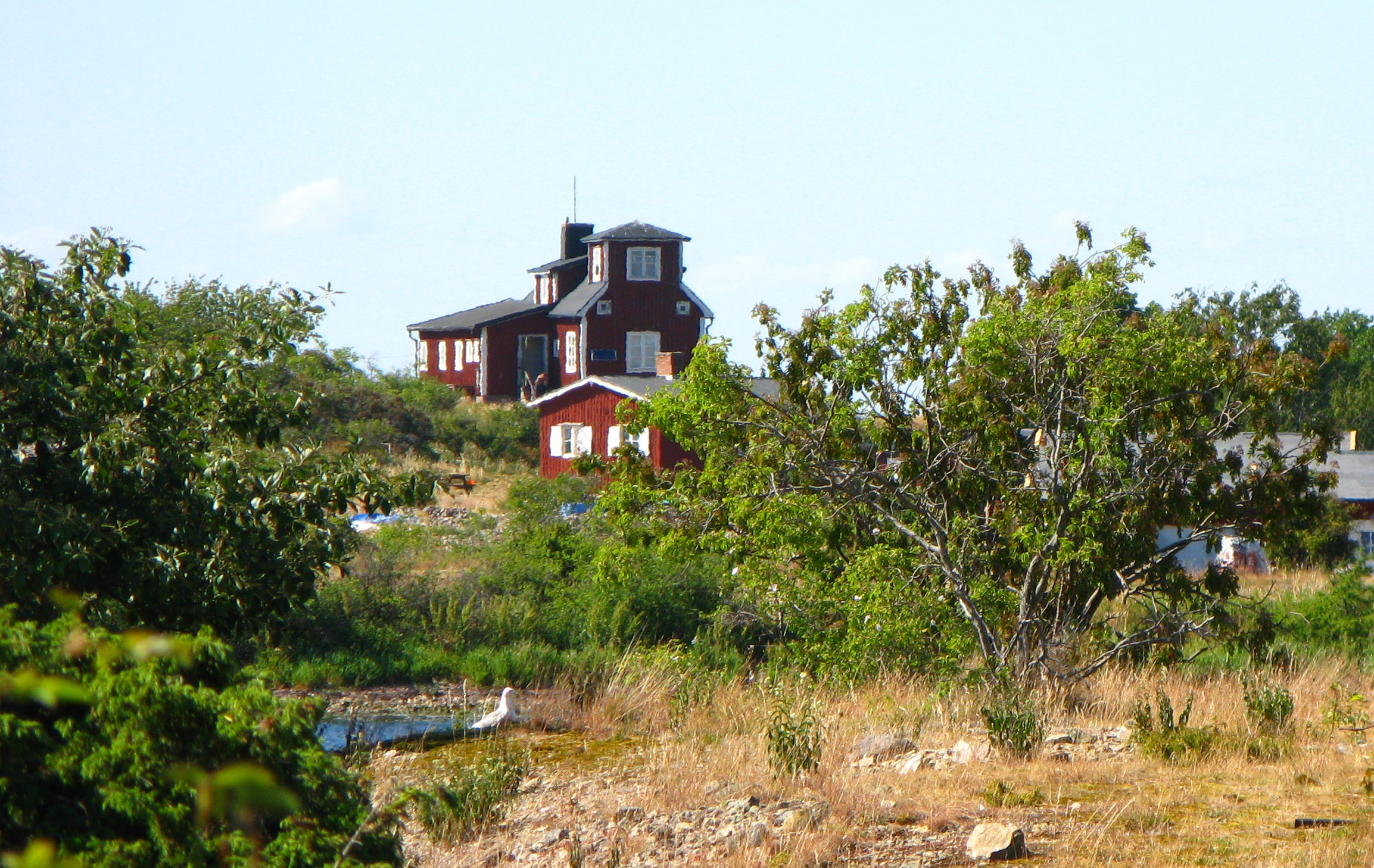 Furö lotsstuga.